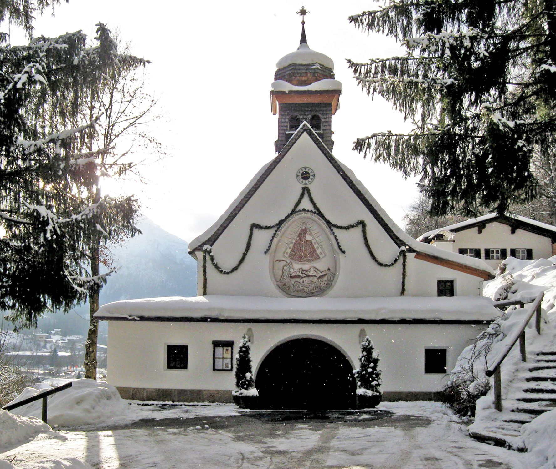 Maria am Berg in BerchtesgadenThis is a photograph of an architectural monument.